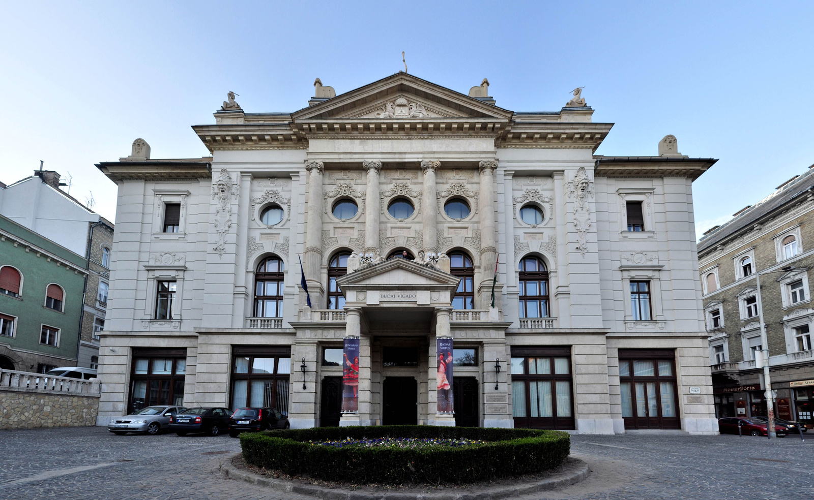 Budai Vigadó (Budapest 1, Corvin tér 8.) This is a photo of a monument in Hungary, Identifier: 12221